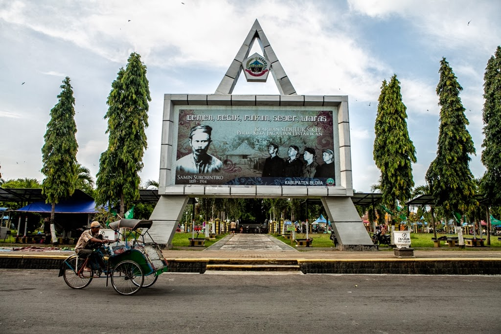 Alun Alun Blora